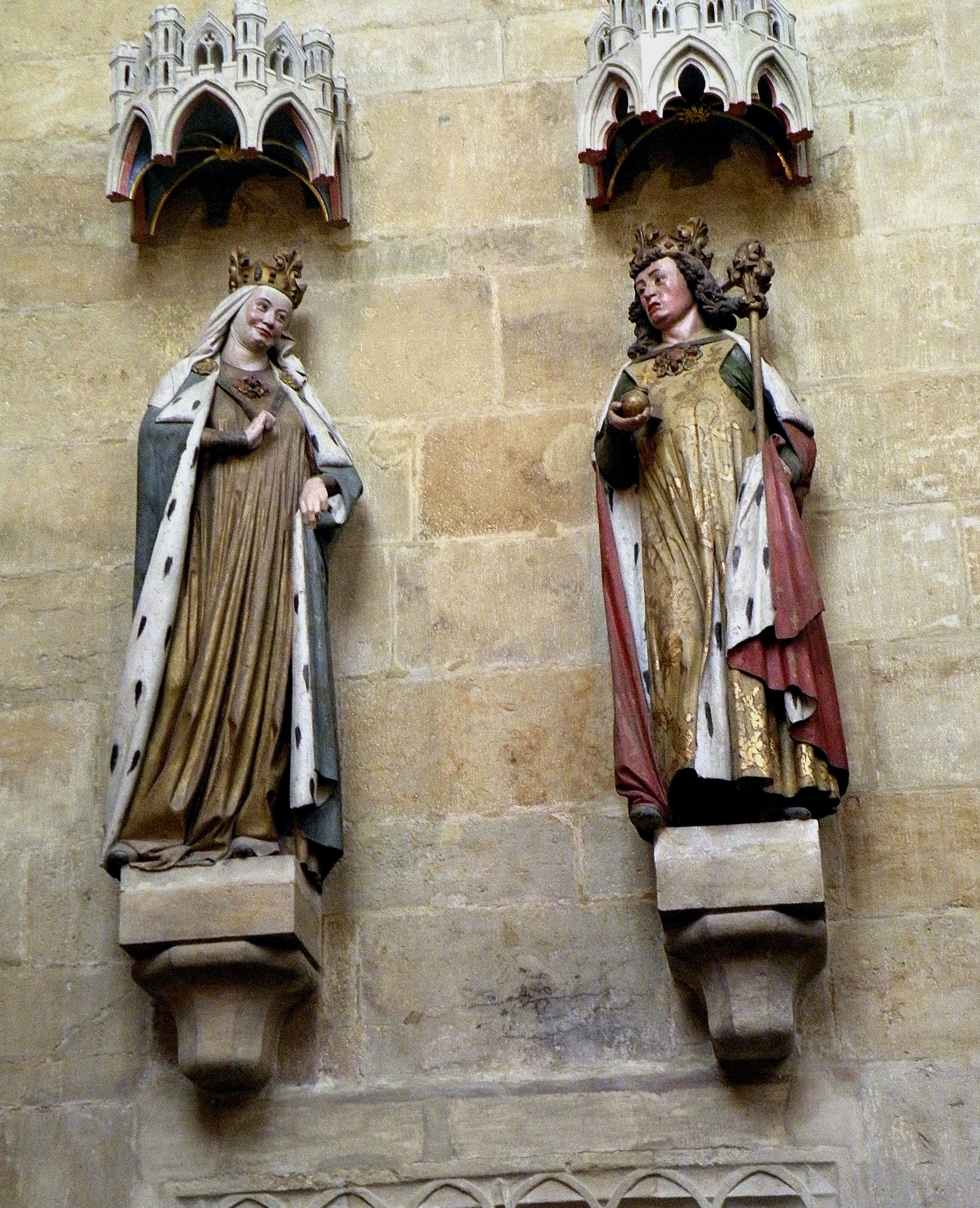 Оттон I и Адельгейда. Дом. Мейсен